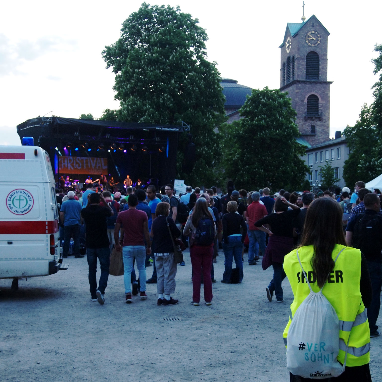 Christival 2016, Konzertbühne auf dem Friedrichsplatz